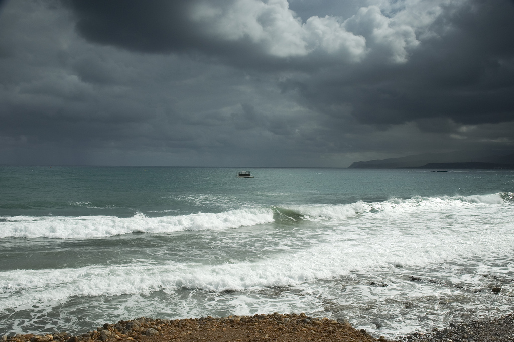 Stalida Sea Storm